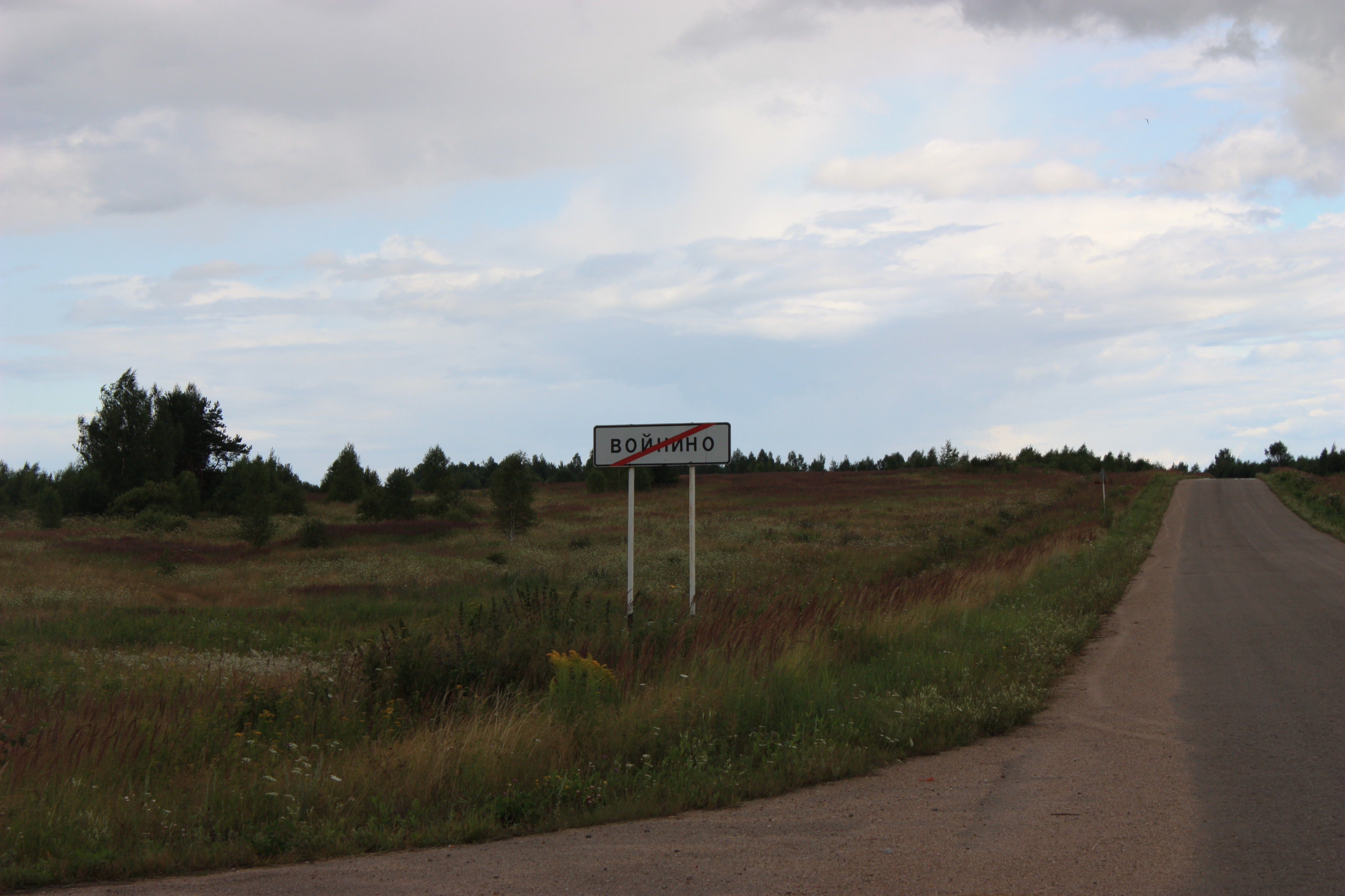 Войнино.